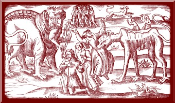 Les mmosntres Bigorne et Chieceface, dévorant l'un le mari et l'autre la femme